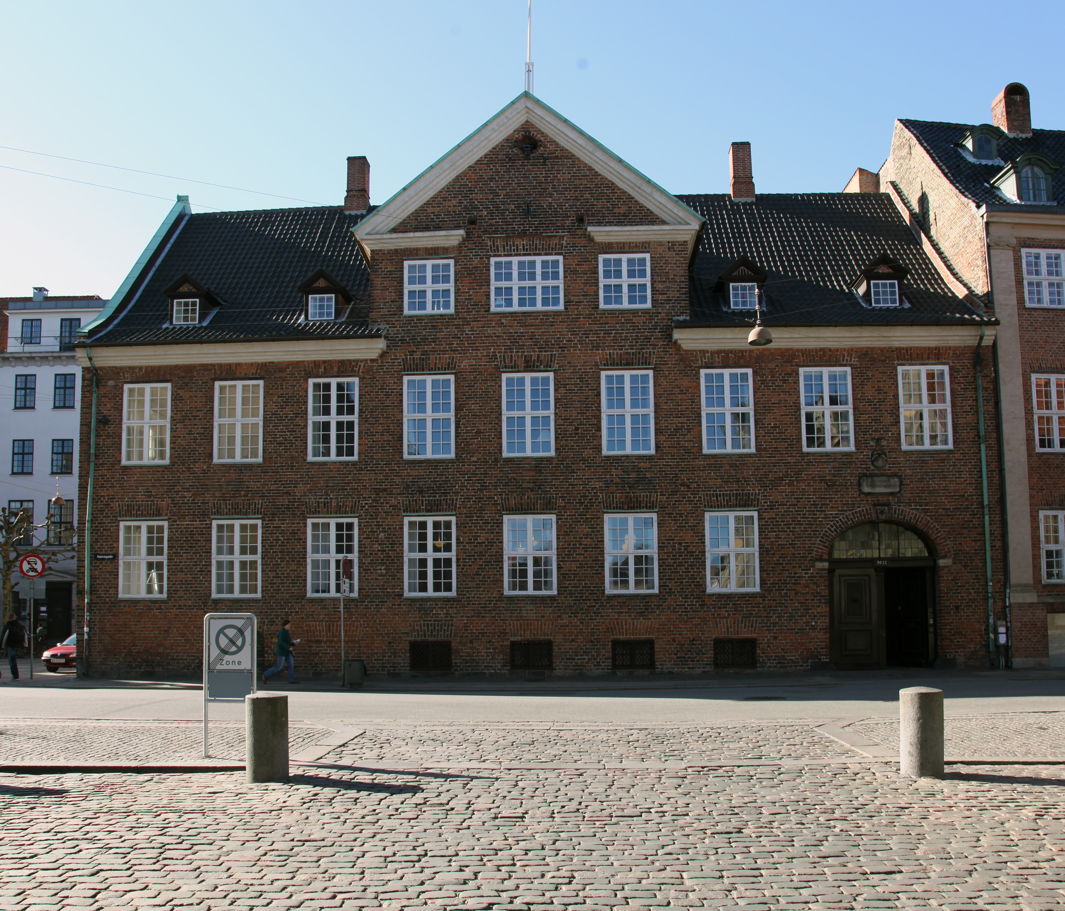 Den københavnske bispegård i Nørregade 11.